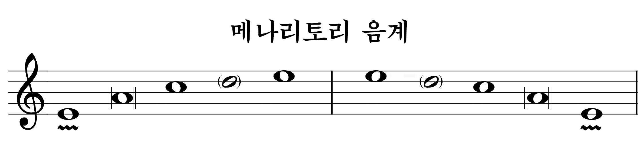 동부민요에서 나타나는 선법의 음계.